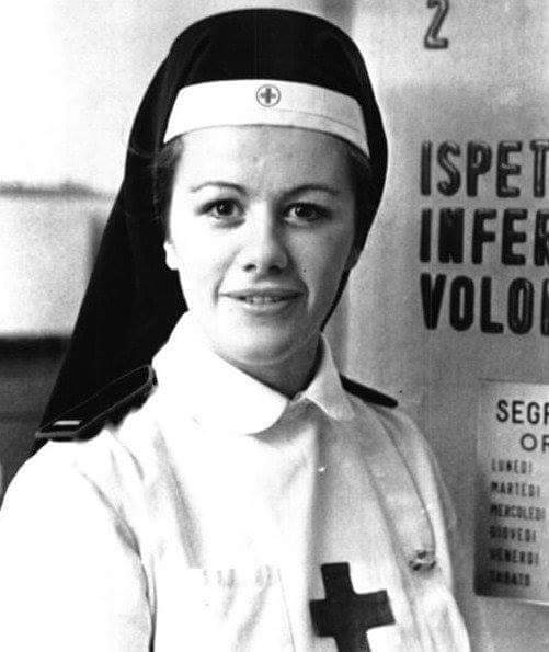 Emanuela Setti Carraro in divisa da Infermiera Volontaria della Croce Rossa Italiana.